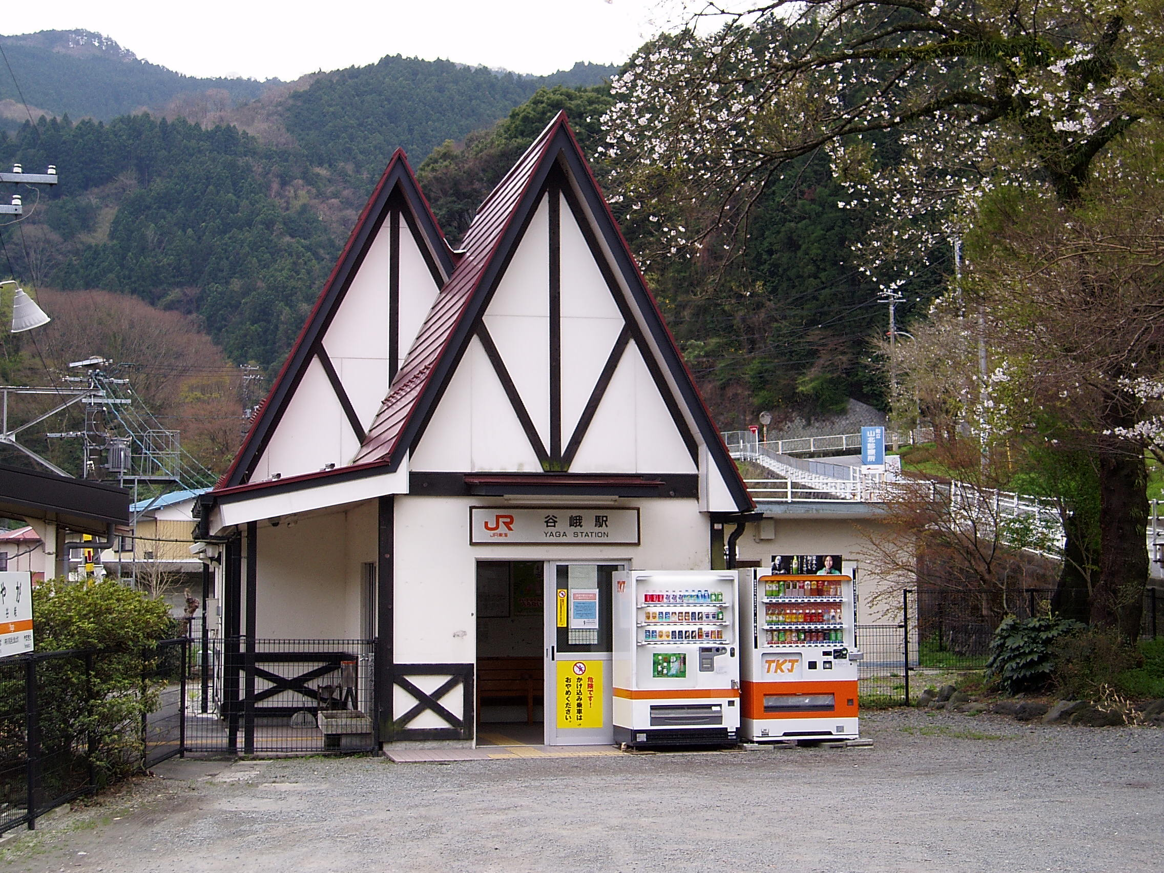 御殿場線・谷峨駅 2007.04.06